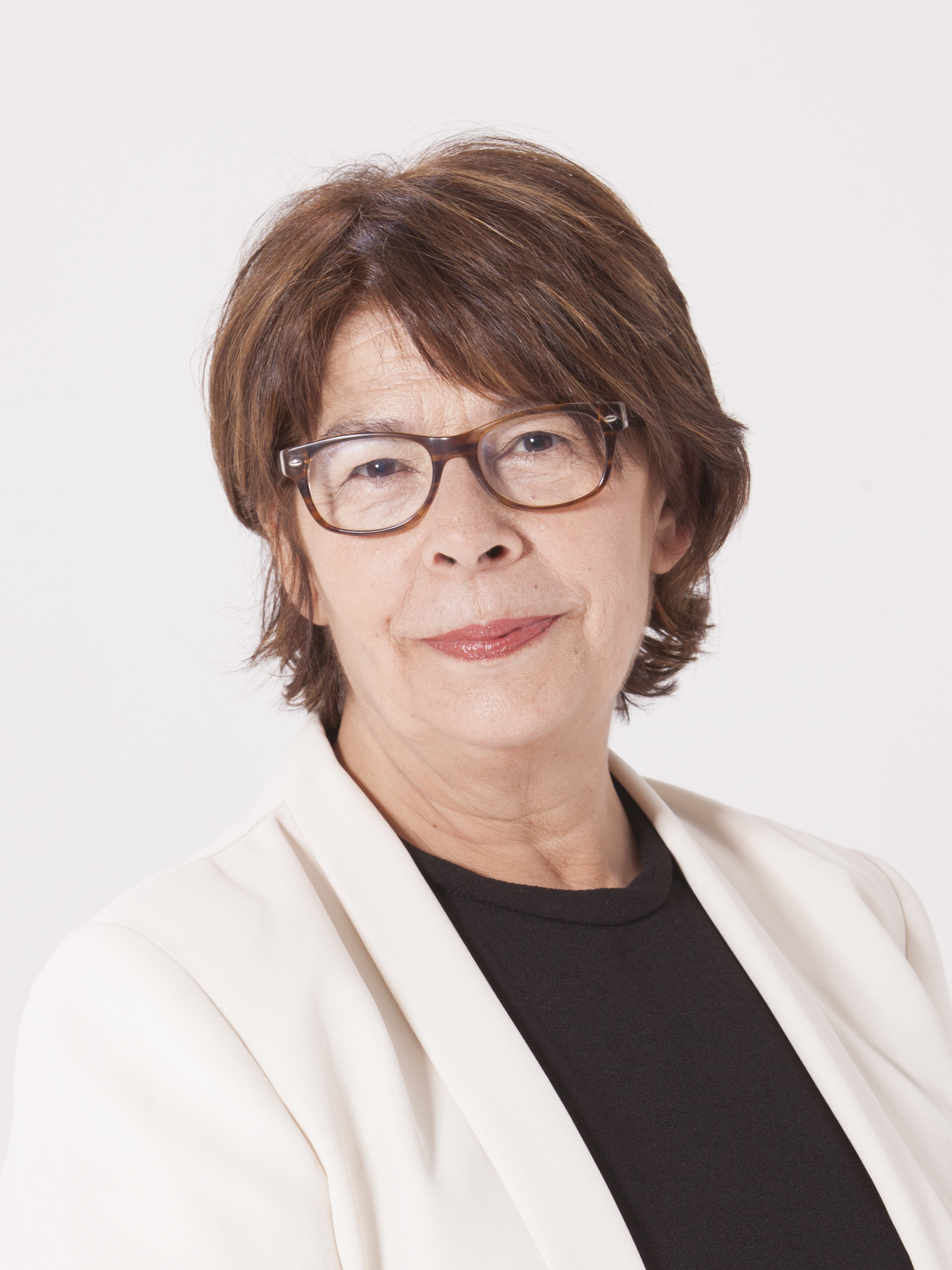 Candidatura de Ahora Madrid en las elecciones de 2015